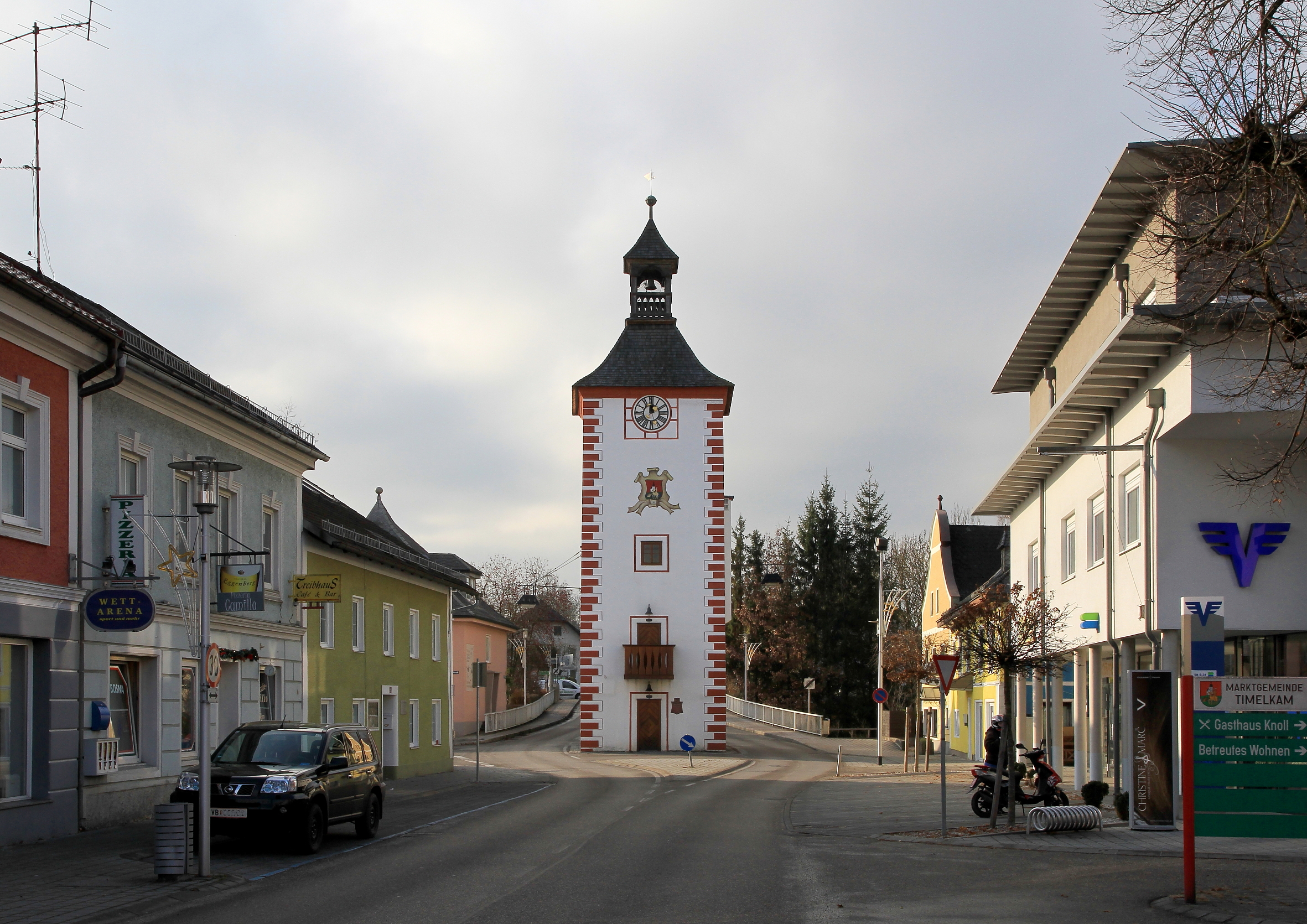 Der denkmalgeschützte Marktturm in der oberösterreichischen Marktgemeinde Timelkam. 1610 errichtet; bis 1842 Sitz des Marktrates und von 1706 bis 1919 als Mautturm in Verwendung.